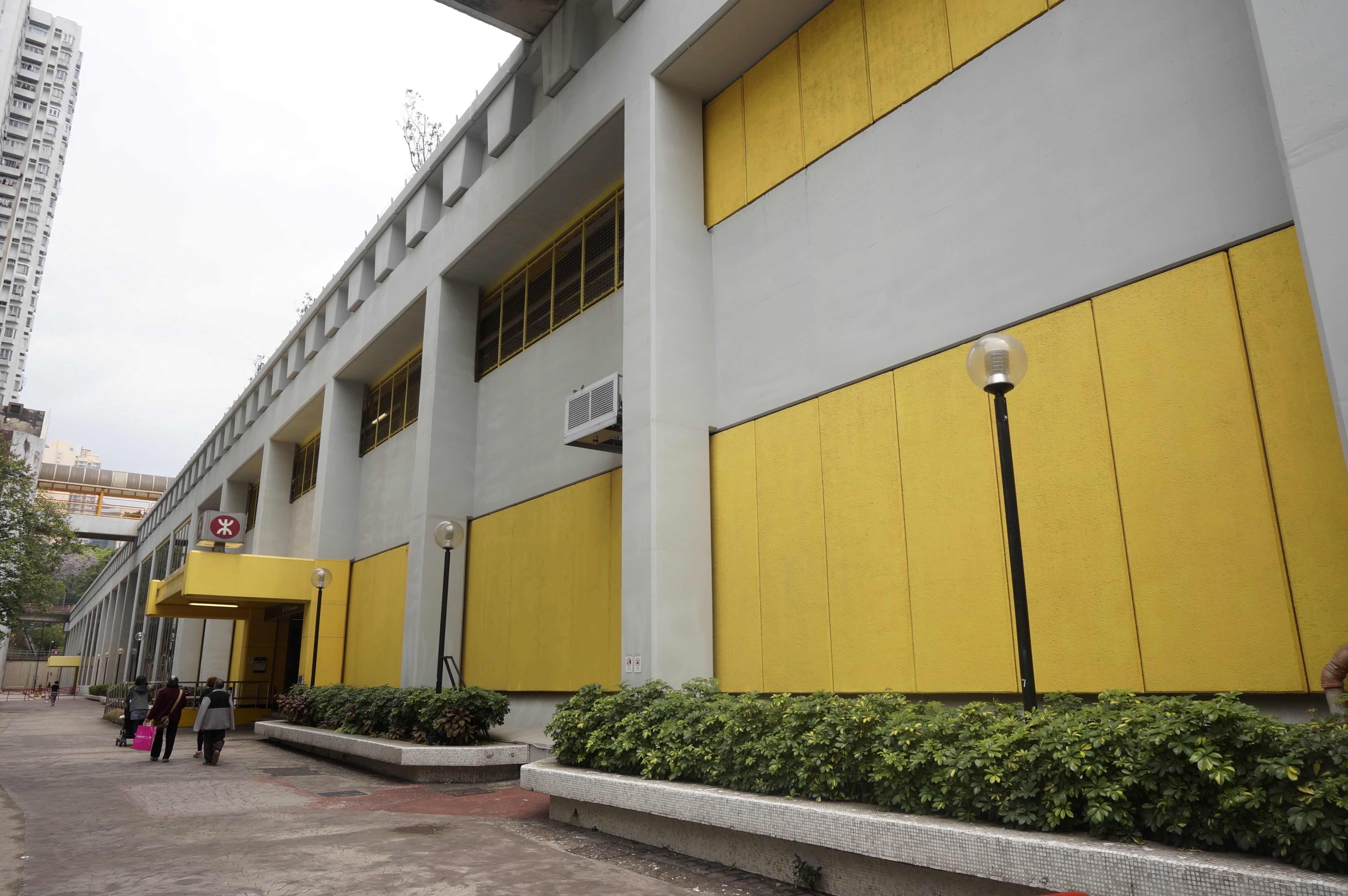 港鐵葵興站外貌